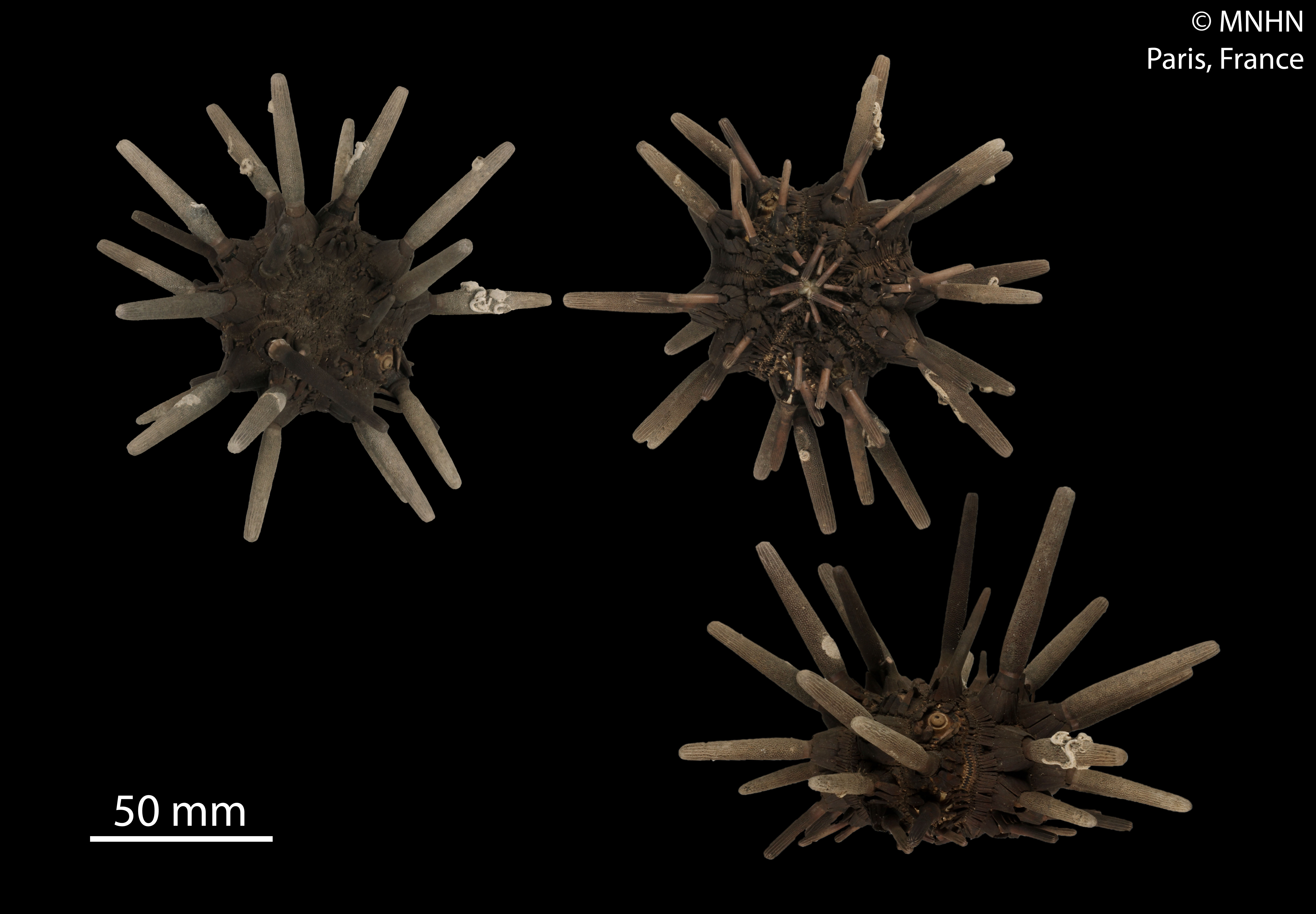 Phyllacanthus parvispinus, collection du Muséum National d'Histoire Naturelle (Paris, France).